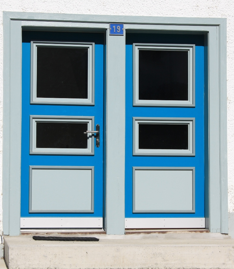 Zwei Haustüren (eine für Juden und eine für Christen) an einem alten Haus in Lengnau AG, Schweiz - heute wird nur noch eine benutzt